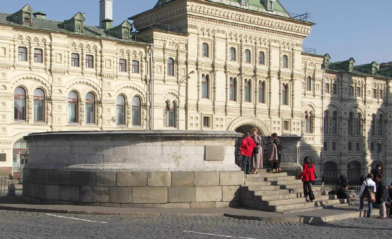 Lobnoe place, Moscow